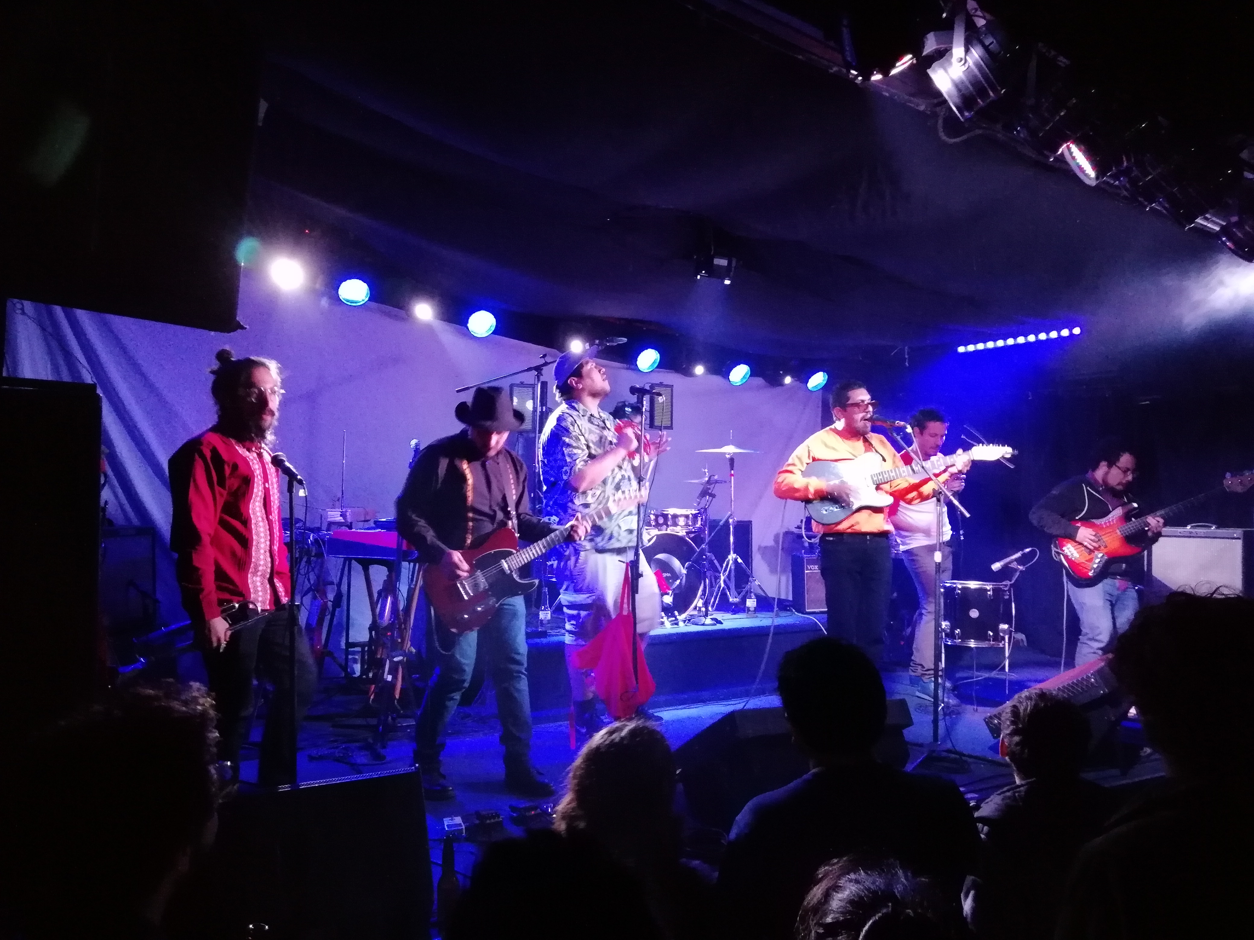 Belafonte Sensacional en el Multiforo Cultural Alicia